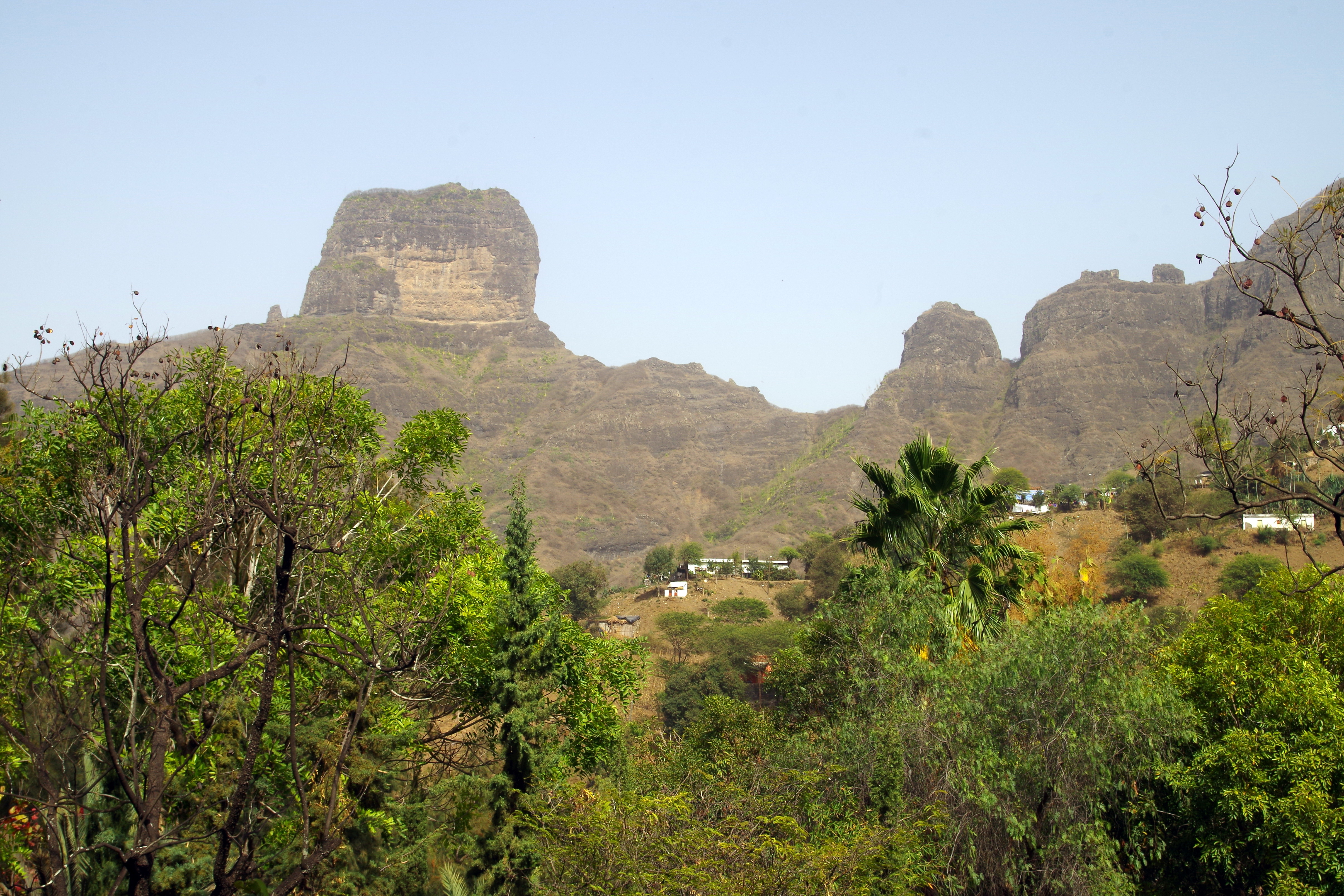 Umgebung von São Domingos (Cape Verde)